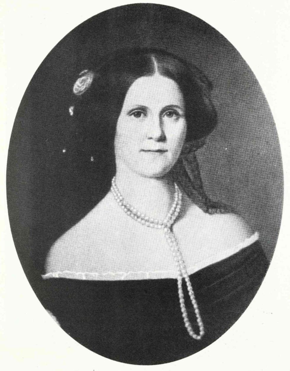 Баронесса Елизавета Карловна Унгерн-Штернберг, ур. Толь (23.09.1821—02.09.1865)